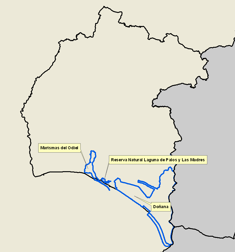 Mapa de Sitios Ramsar en la provincia de Huelva (España)